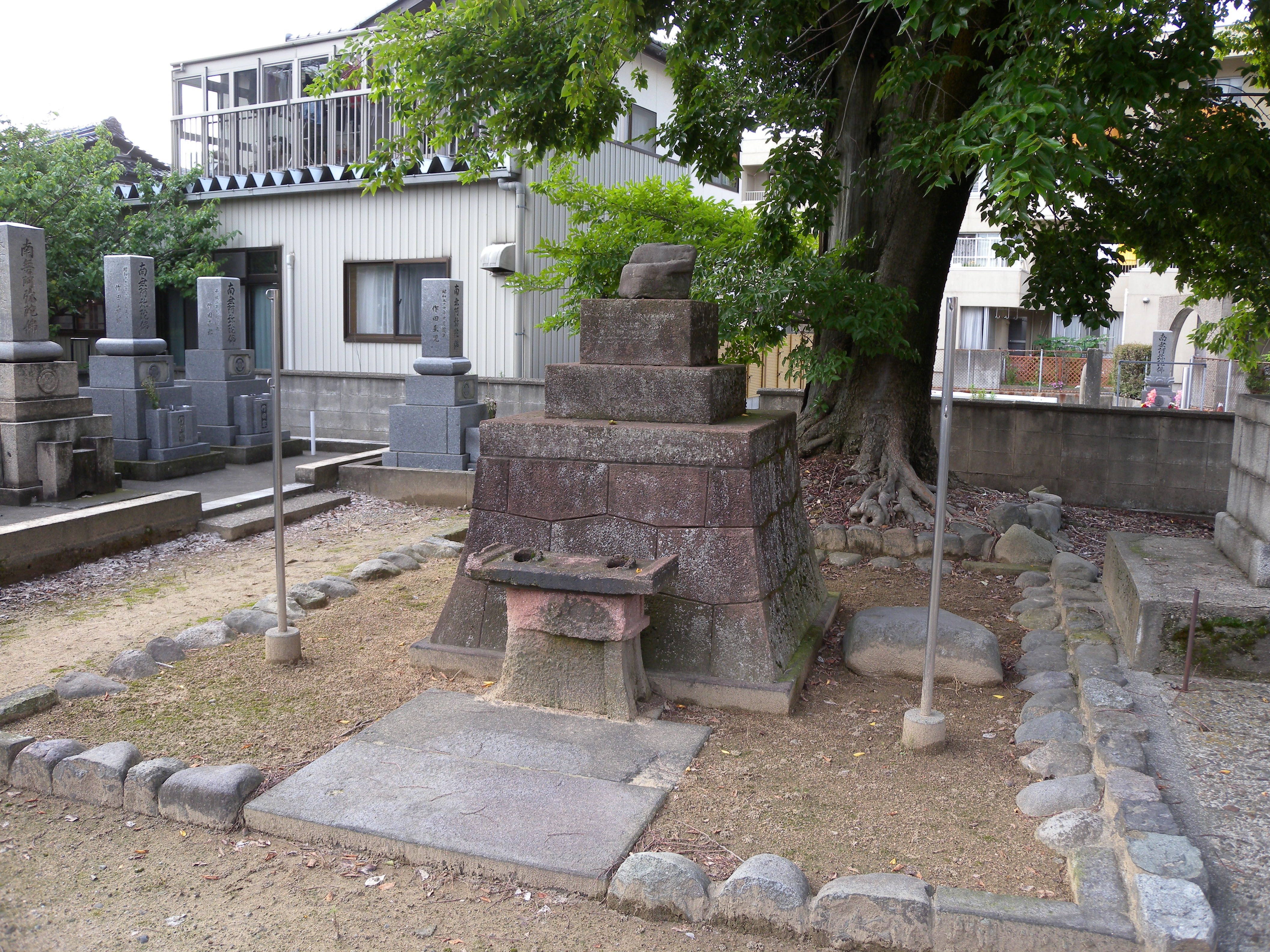 慶覚寺開基洲崎慶覚墓所